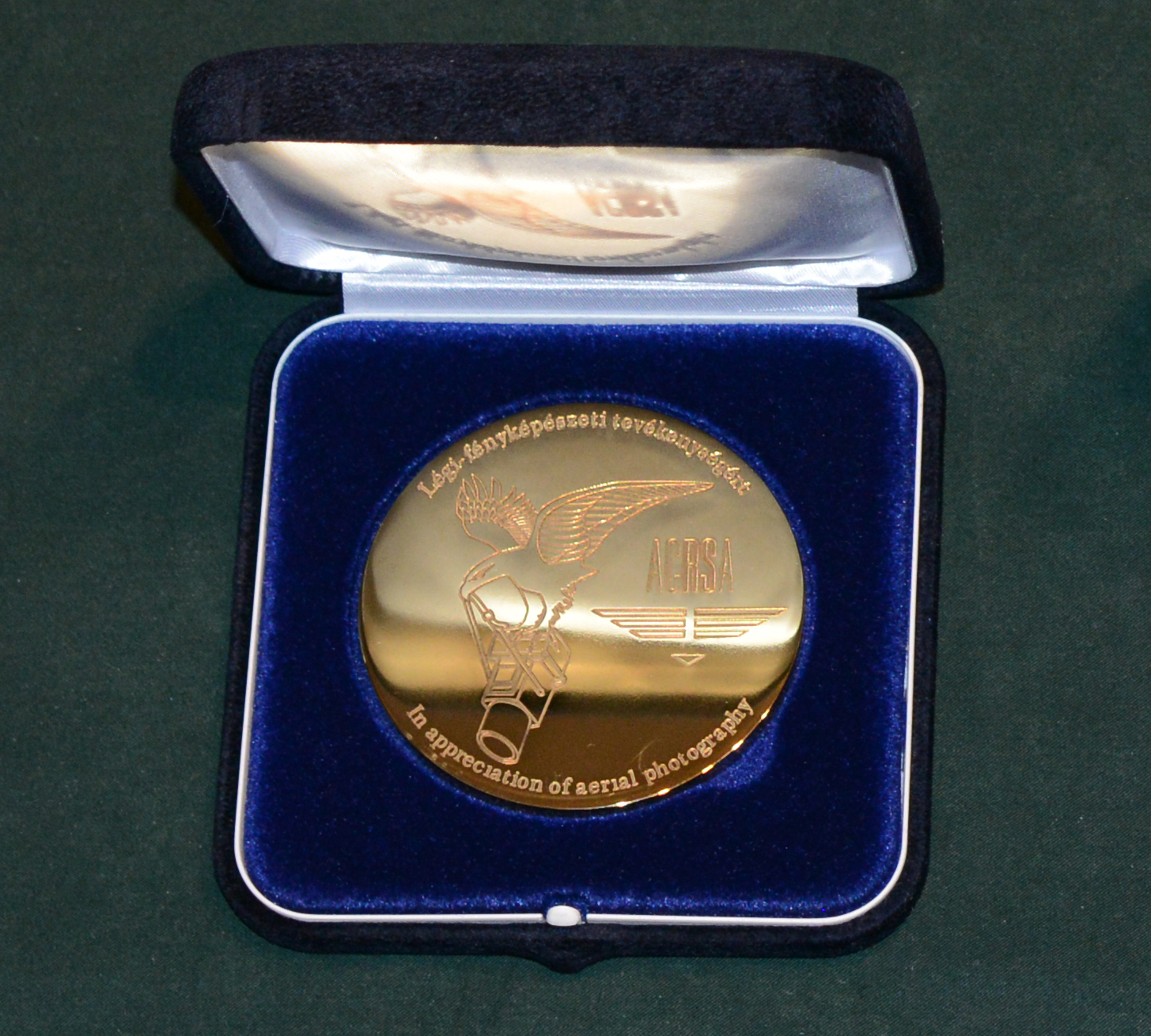 A repülőgép fedélzeten dolgozó személyzet emlékérem változata